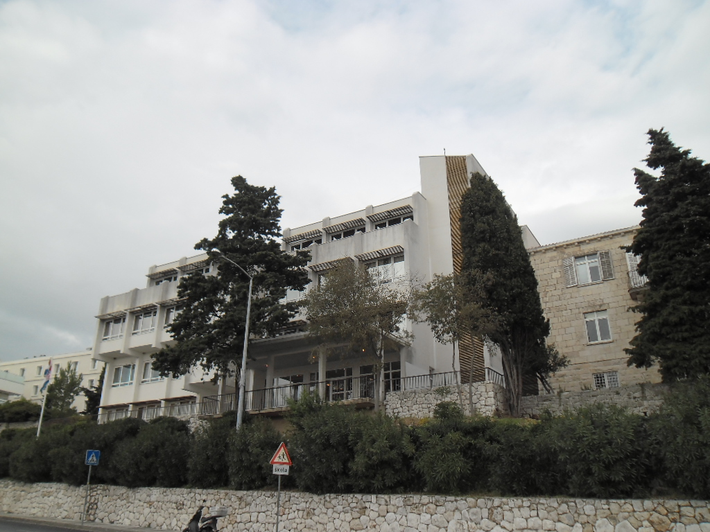 zgrada Obrtničke škole Dubrovnik